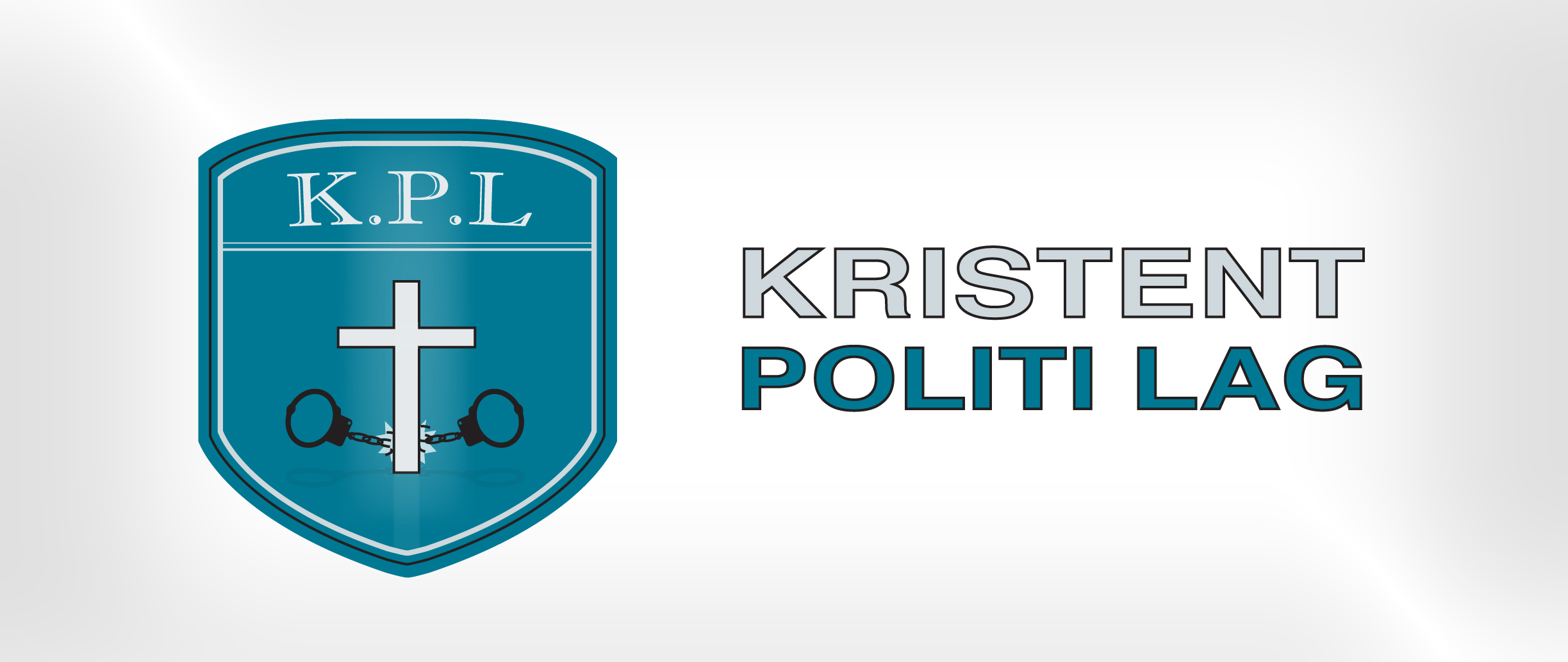 Logo - kristent Politi Lag Norge